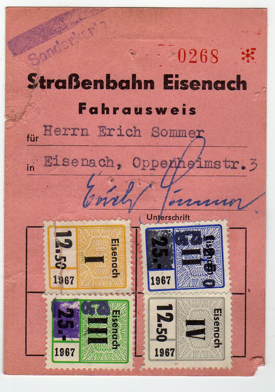 Historische Jahresfahrkarte der Straßenbahn Eisenach von 1967